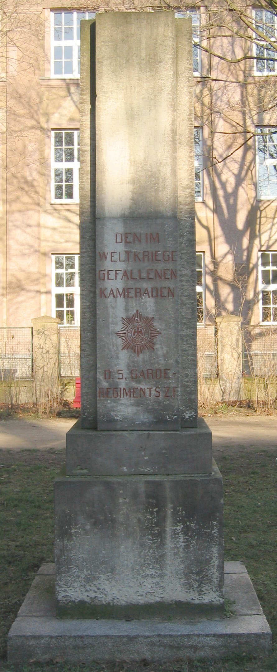 Berlin-Spandau, Denkmal für das 5. Garderegiment z.F.